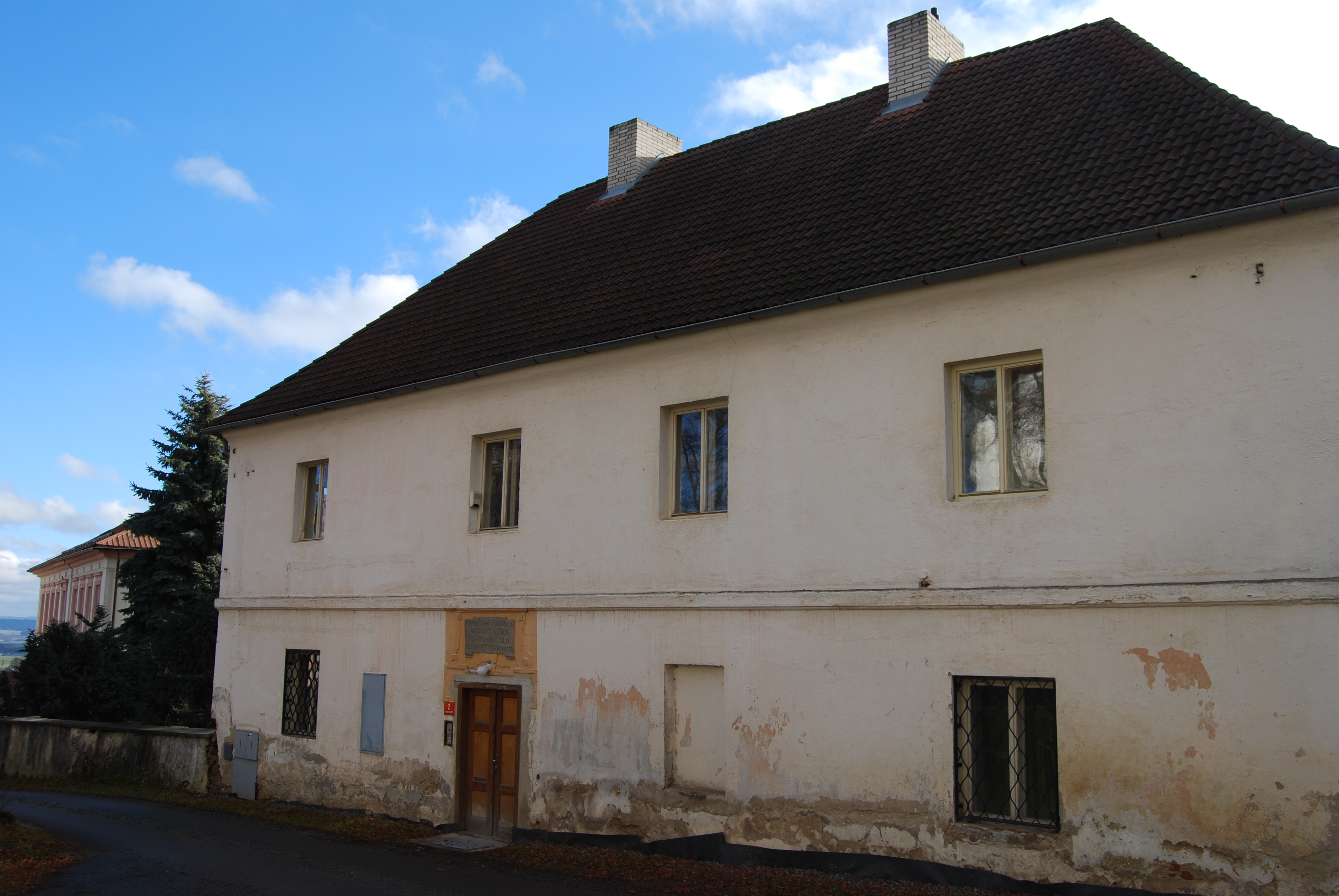 Fara. Chotoviny v okrese Tábor v Jihočeském kraji. Česká republika.